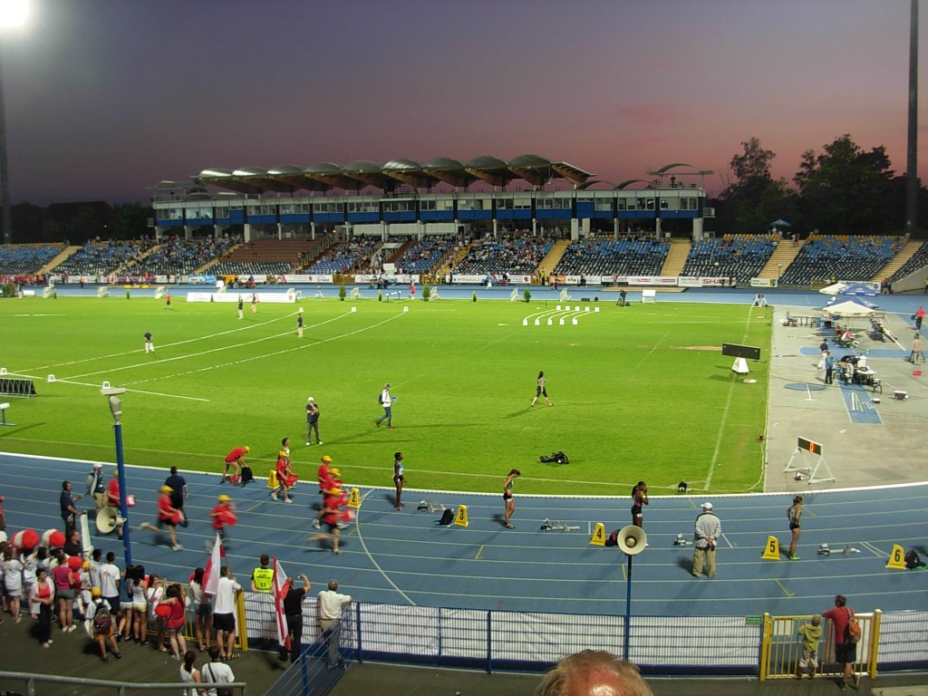 Stadion Zawiszy Bydgoszcz podczas mityngu Enea Cup 2011